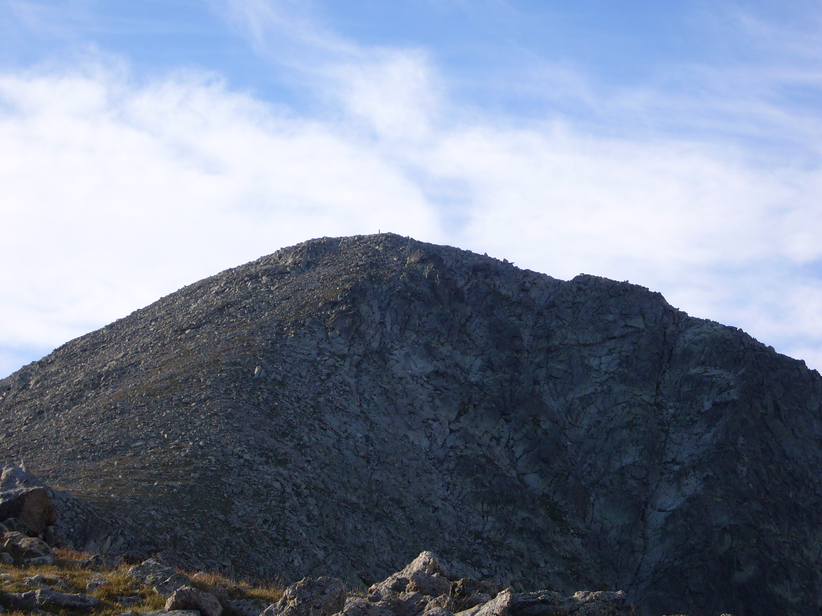 lo Pessó Petit, vist des de la Coma del Pessó; la Vall de Boí, Alta Ribagorça, Catalunya